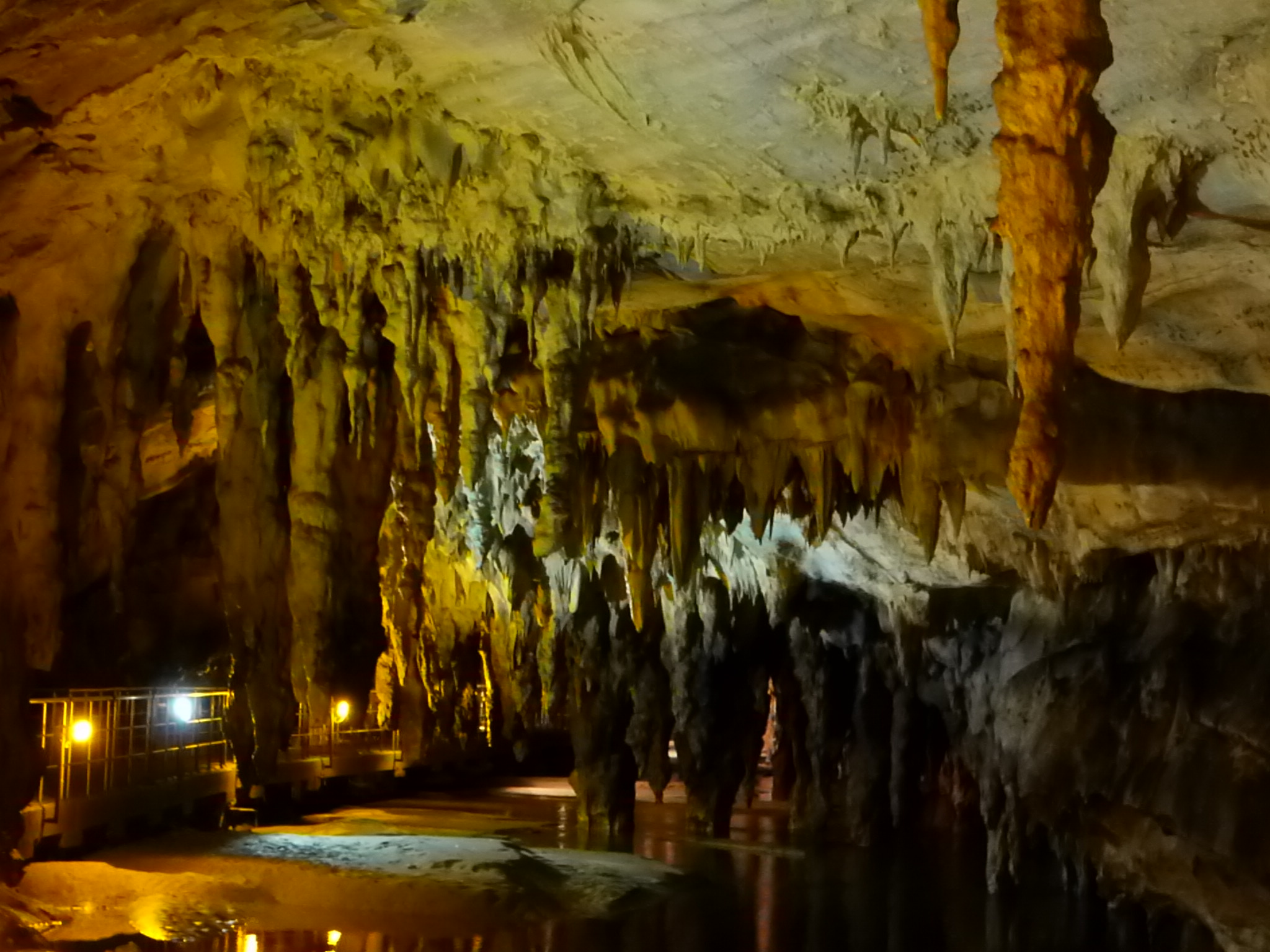 Σπήλαιο πηγών Αγγίτη«Σπήλαιο Αγγίτη»